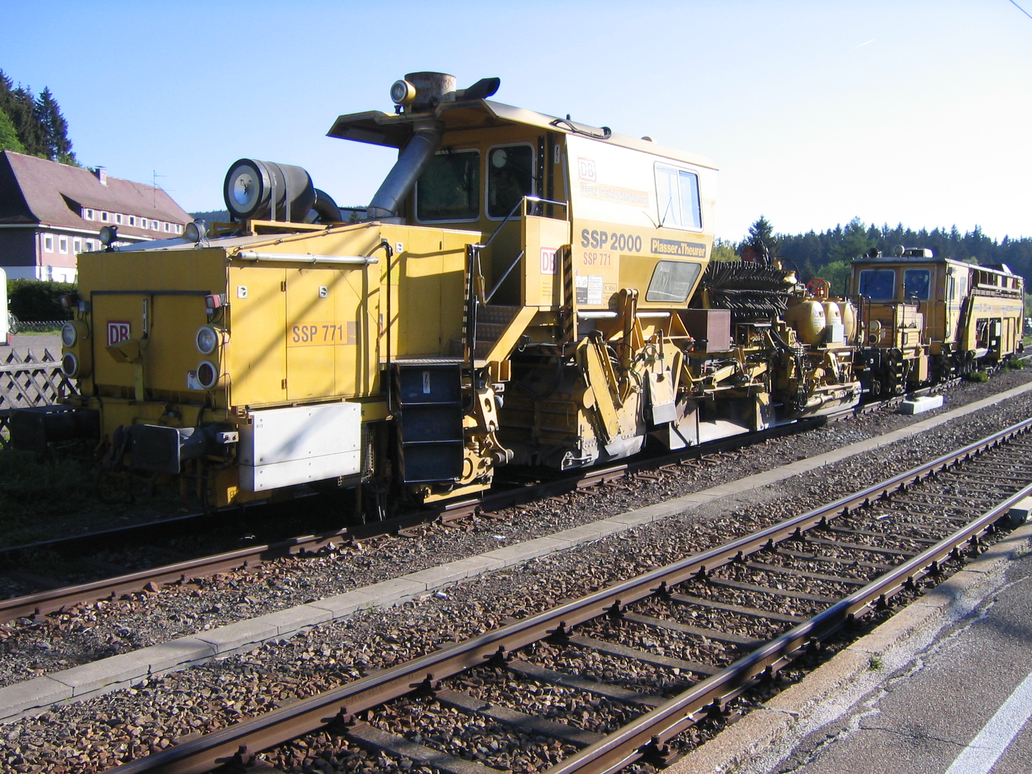 Plasser & Theurer SSP 2000 und Gleisstopfmaschine 08-32U in Titisee